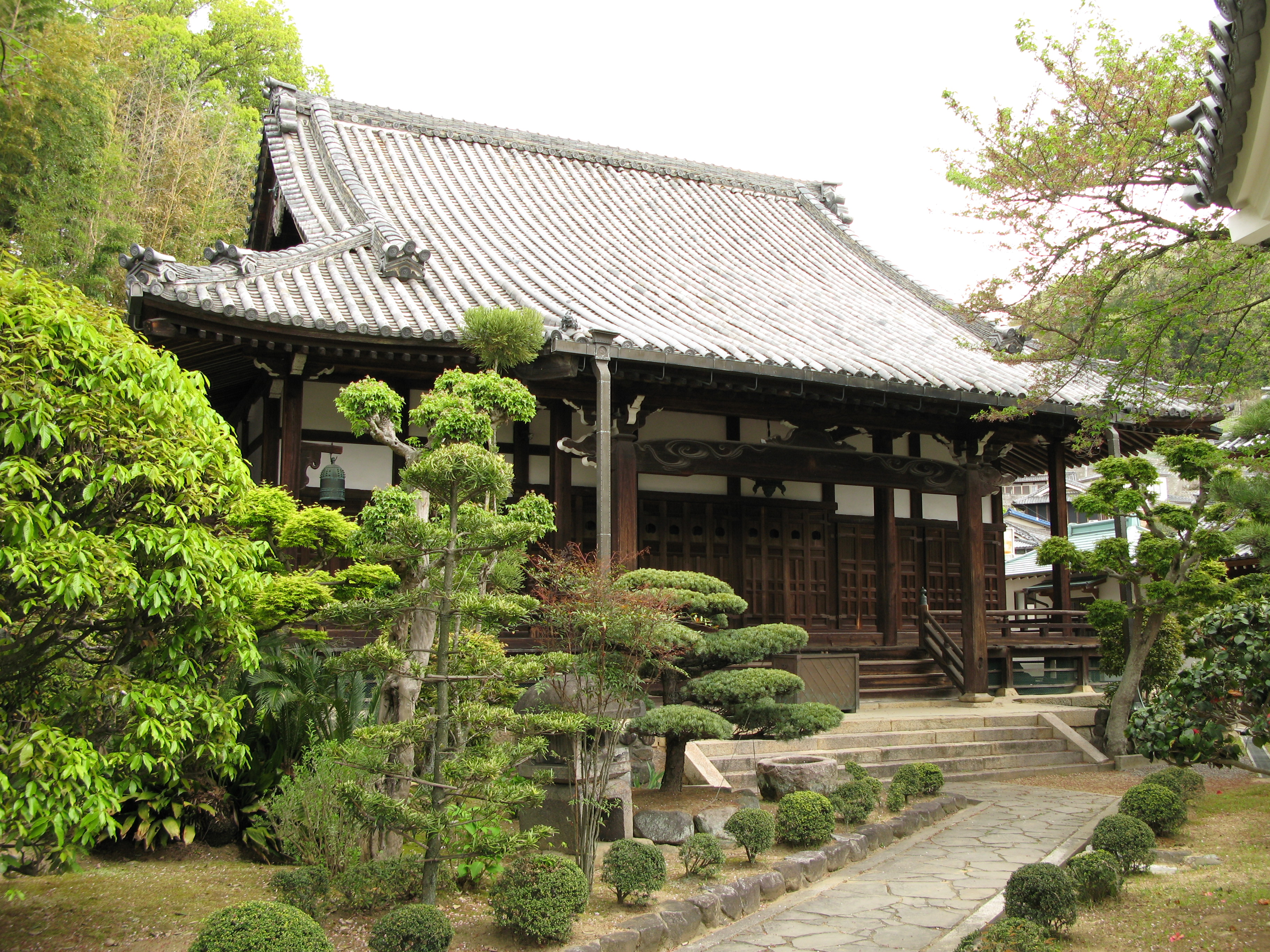 Koutokuji in Kashiwara, Osaka, Japan